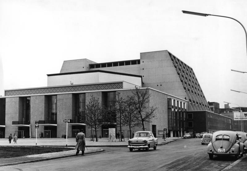 Köln (Nordrhein-Westfalen) Großes Haus Um die Theater-Neubauten in der Bundesrepublik war während der Planung ein heftiger Streit zwischen konservativer Richtung (Guckkasten-Bühne) und moderner Regie (Einbeziehung und Übergang der Bühne in den Zuschauerraum - Simultanbühne Shakespeares) entbrannt. Man schloss - bis auf das Nationaltheater Mannheim - allseits Kompromisse und versuchte, durch jeweilig anzubringende Überbrückung des Orchesterraumes den intensiven Zusammenhang von Bühne und Zuschauerraum herzustellen. Im Zuschauerraum fielen die Logen, sie wurden entweder durch breite Ränge oder vorlaufende "Schwalbennester" (auch Logenschlitten genannt) ersetzt, die alle Zuschauer nahe ( in Kölns Großem Haus bis auf 29 m ) zur Bühne heranbringen. Grösster Wert wurde auf eine technisch vollendete Bühnenausstattung (Beleuchtung) gelegt. Musste auf altem Grundriss oder halb zerstörtem Haus (wie die Hamburger Staatsoper) aufgebaut werden, waren die Umgestaltungsvorgänge äusserst kompliziert - man blieb konservativer. In Köln konnten dagegenfast alle neuen Prinzipien durchgeführt werden. Kölns "Grosses Haus" (Architekt Wilhelm Riphahn) mit 1380 Sitzplätzen wurde am 18. Mai 1957 nach eineinhalbjähriger Bauzeit eröffnet. Die Baukosten betrugen 15 Millionen DM. Der kühne Aussenbau erhielt im Volksmund bald den Namen "Das Grabmal des unbekannten Intendanten". 34 m hoch ragt das konische Bühnenhaus empor. Die Innenräume, Foyer und Umgänge zeichnen sich durch einfache Eleganz aus.